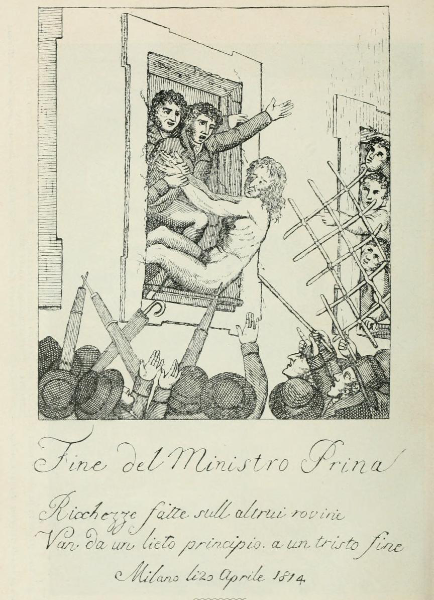 Vignetta satirica apparsa a Milano dop l'uccisione di Giuseppe Prina, 1814